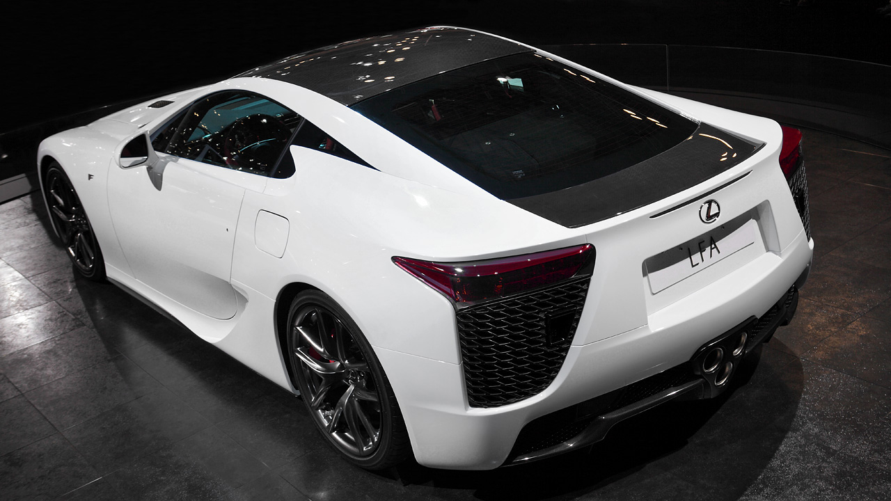 Lxus LFA.